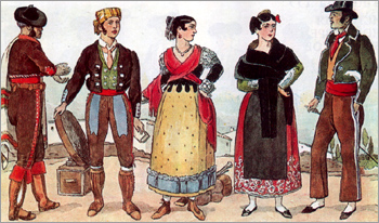 Clothing of Spain: Malaga, Sierra-Morena, Andalusia Малага, Сьерра-Морена, Андалузия: 1. Мужчина из Малаги. 2. Хозяин гостиницы в горах Сьерра-Морена. Куртка из шкурок ягнят с серебряными застежками, суконные штаны с цветной отделкой, кожаные гетры, головной платок. 3. Жена контрабандиста из Андалузии. Бархатный лиф с серебряной отделкой, кожаные сапожки. 4. "Манола" (кокетливая девушка) из Мадрида. Бархатная мантилья, вышитая юбка, гребень в волосах. 5. "Моноло", или "министраль" - франт из простонародья. Мадрид.